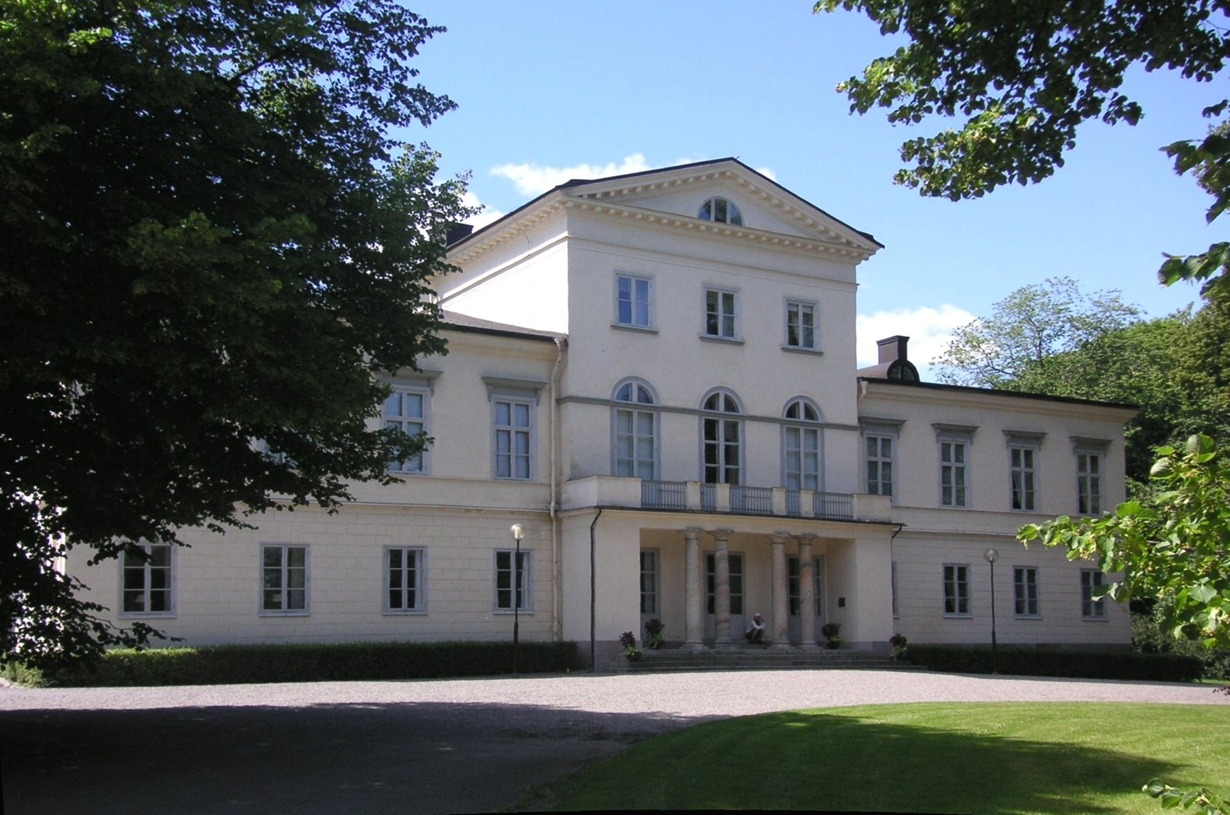 Haga slott, framsidan